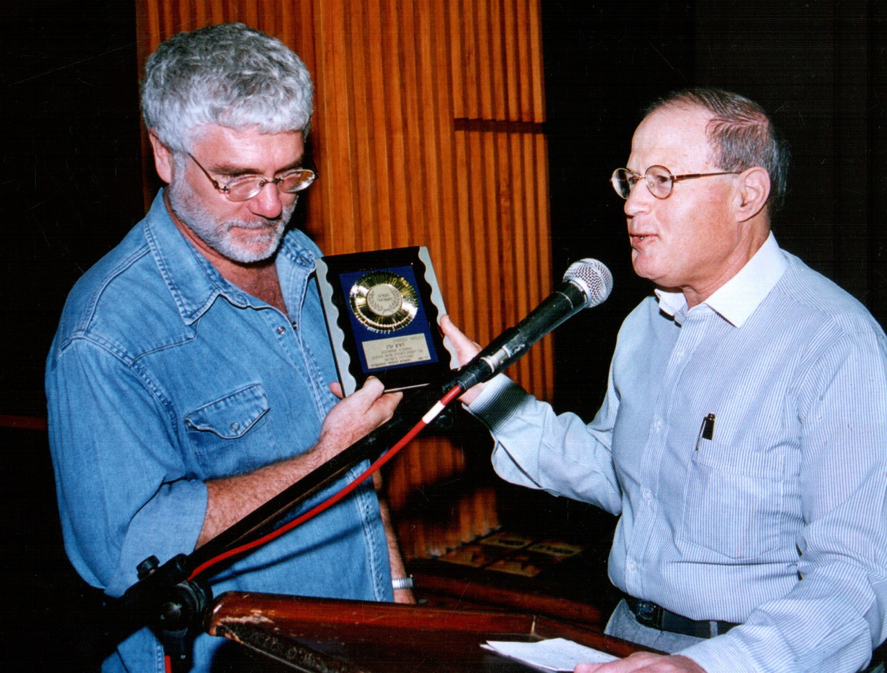 דורון ערן מקבל את פרס היזמות מיו"ר המועדון המסחרי והתעשייתי בישראל, צוותא תל אביב, 2003